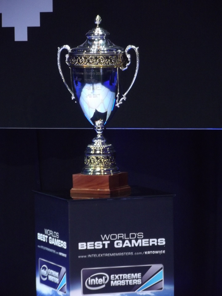 Zdjęcie zrobione podczas Intel Extreme Masters 2013 w katowickim Spodku.